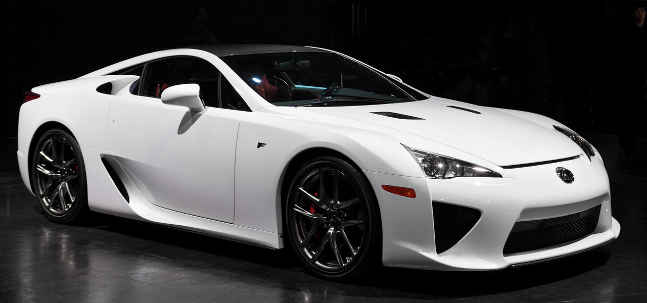 Lxus LFA.